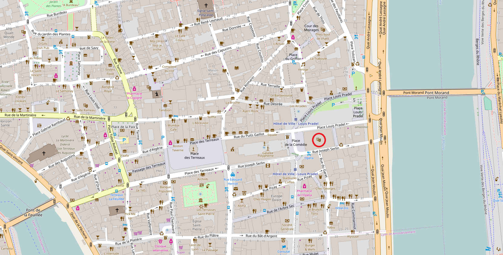 Operagebouw is in het rood omcirkeld.